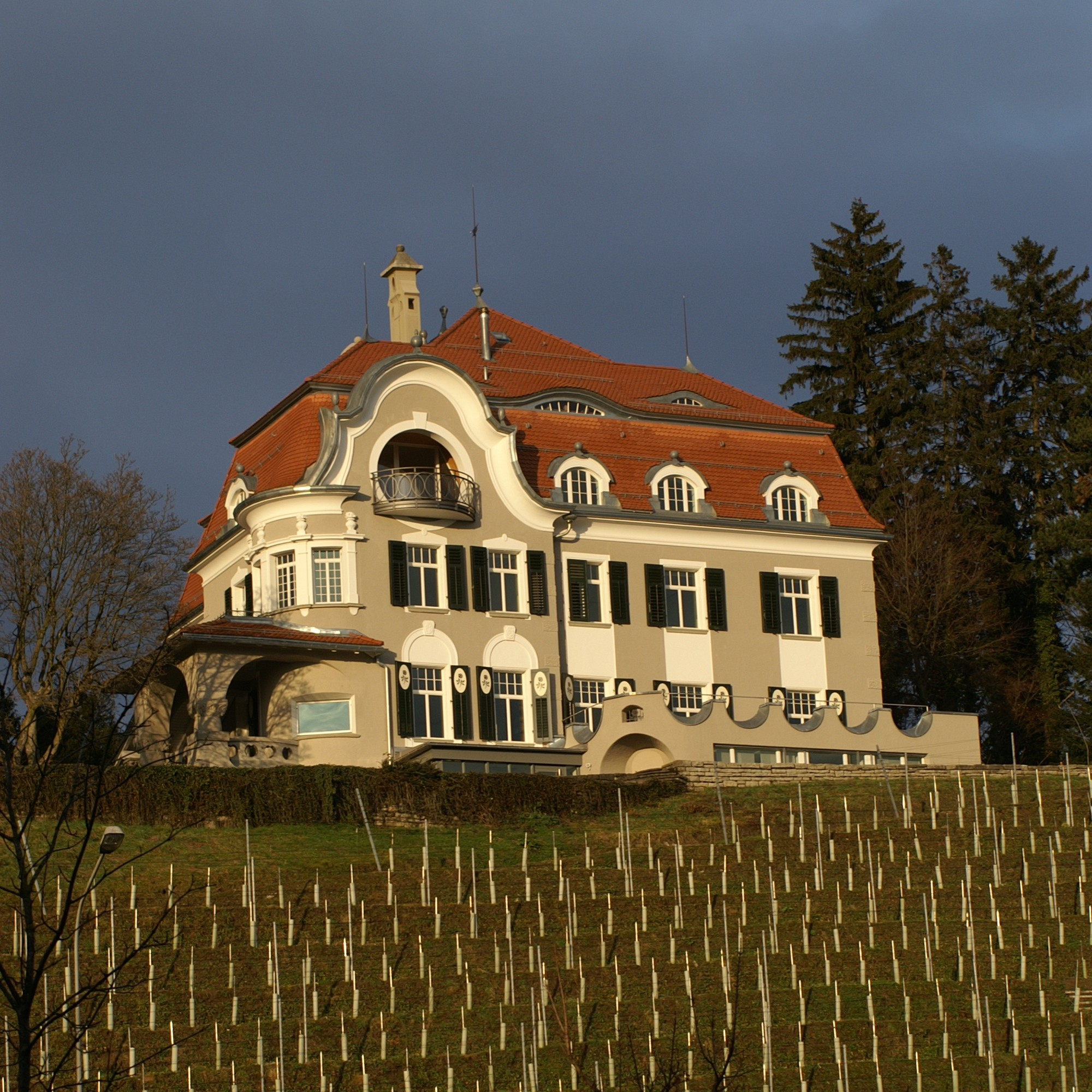 Jugendstilvilla in CH-9436 Balgach